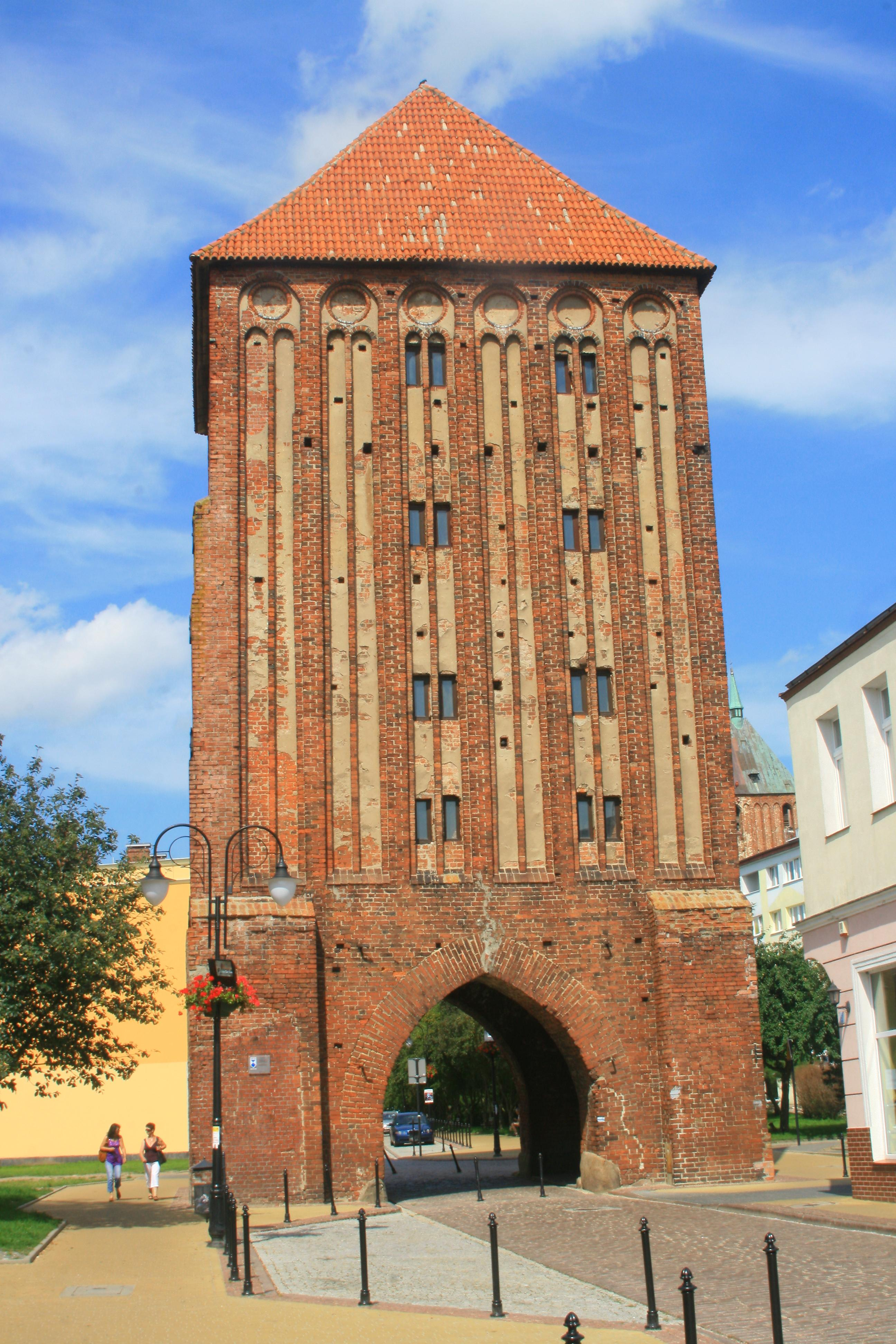 Sławno, Brama Koszalińska